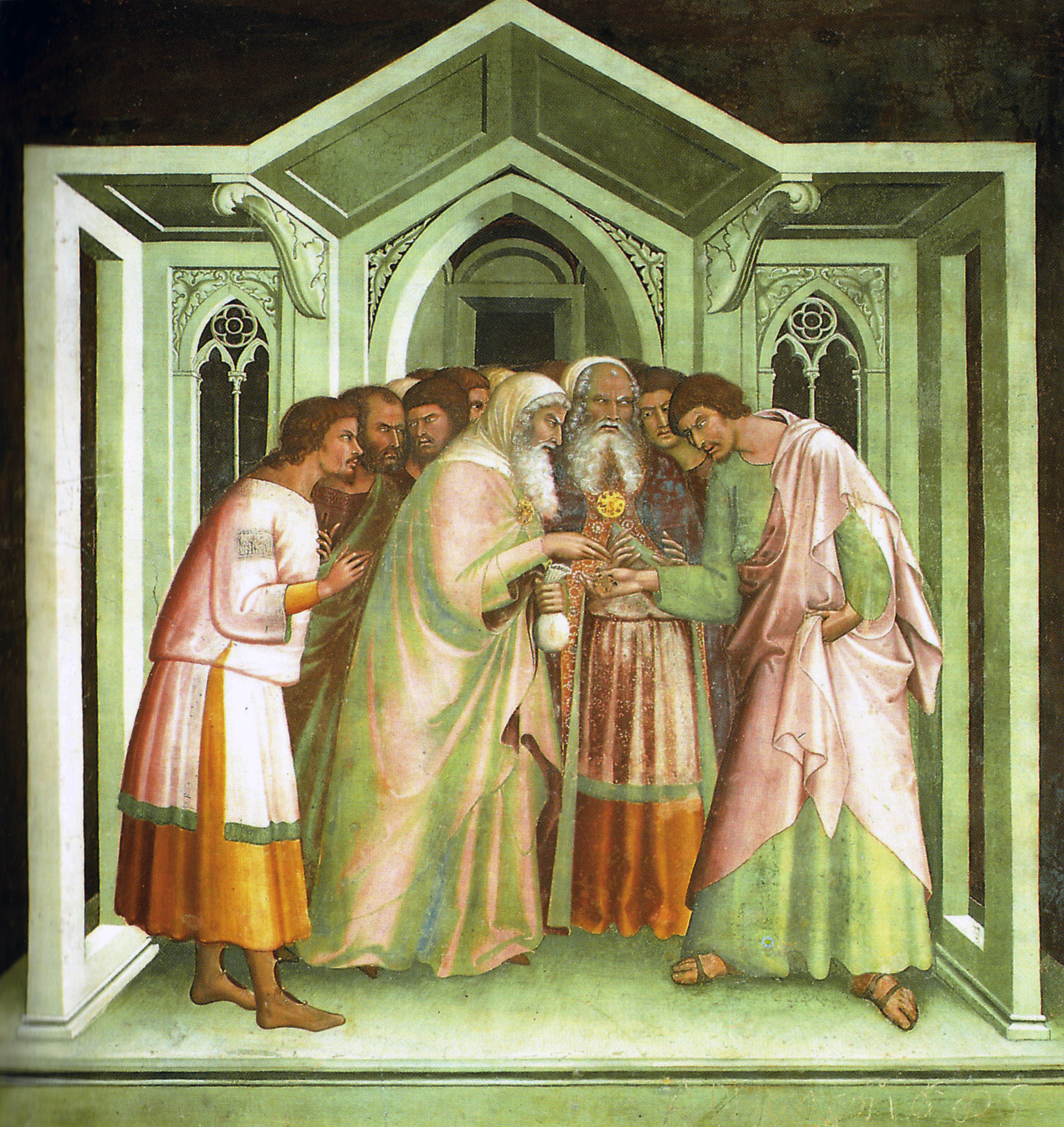 New Testament Cycle Bartolo di Fredi